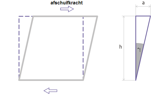 resultaat van afschuiven sloveense (!) wiki; gnu FDL